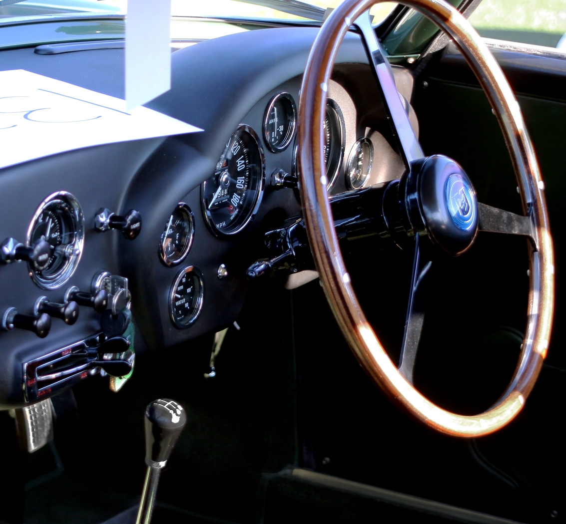 2011 Desert Classic, La Quinta, CA